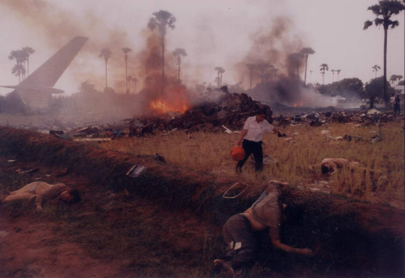 970903중앙119구조본부 베트남 항공 815편 추락 사고 출동